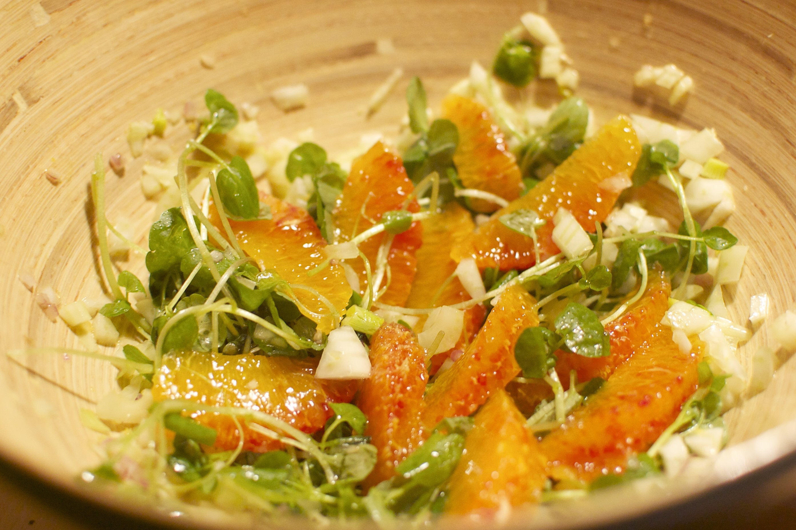 Orangensalat mit Blutorangenfilets, Fenchelwürfeln, Brunnenkresse und Zitronendressing. Geeignet als Vorspeise oder Beilagensalat.